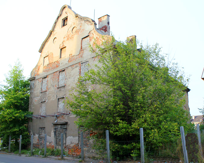 spichrz, ob. dom mieszkalny, 1845 Włocławek, ul. Stodólna 80, miasto Włocławek